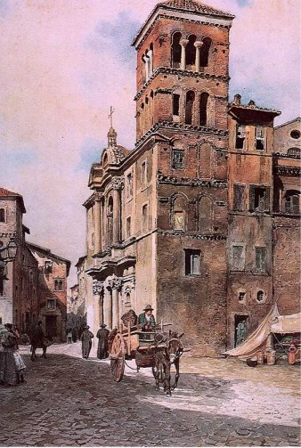 Santa Maria in Monticelli in Rome (rione Regola)